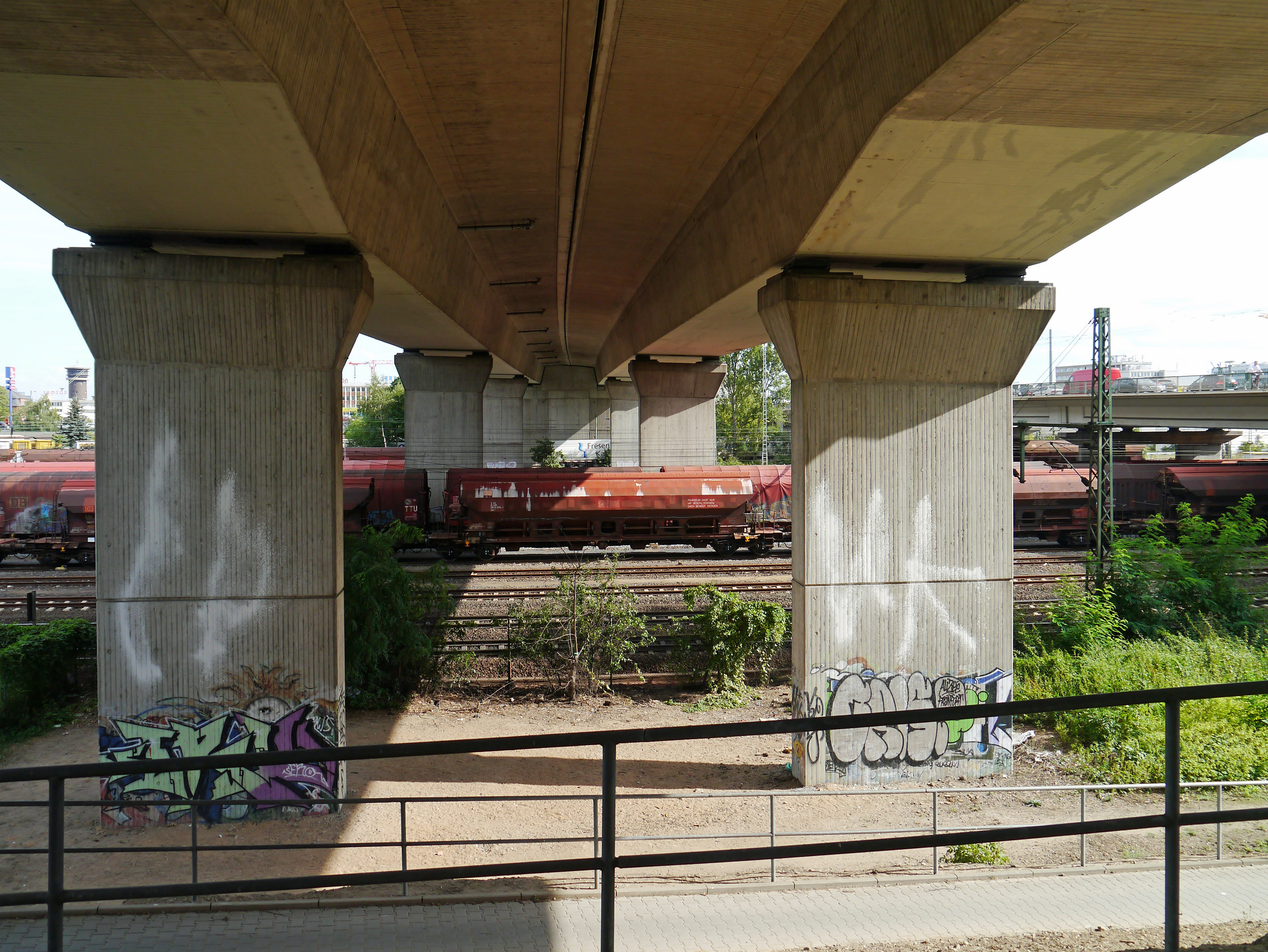 Hochtrasse der A 661. Parallel und oberhalb zur Ratswegbruecke, 2012 gesehen von der Riedespießstrasse in Ffm.